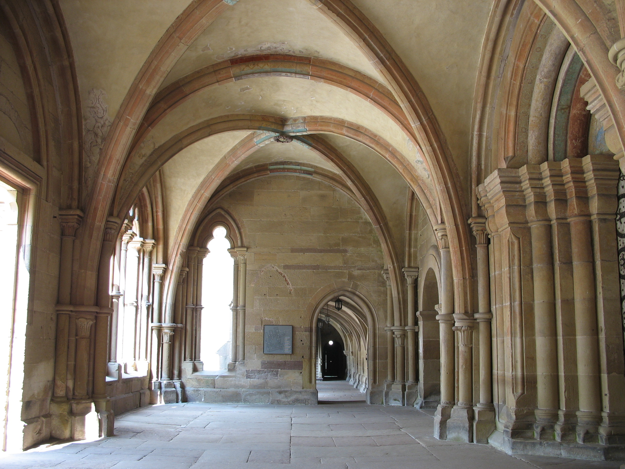 Kloster Maulbronn